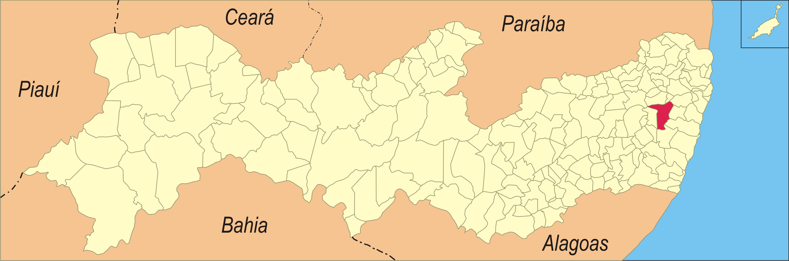 Localização da cidade em Pernambuco.